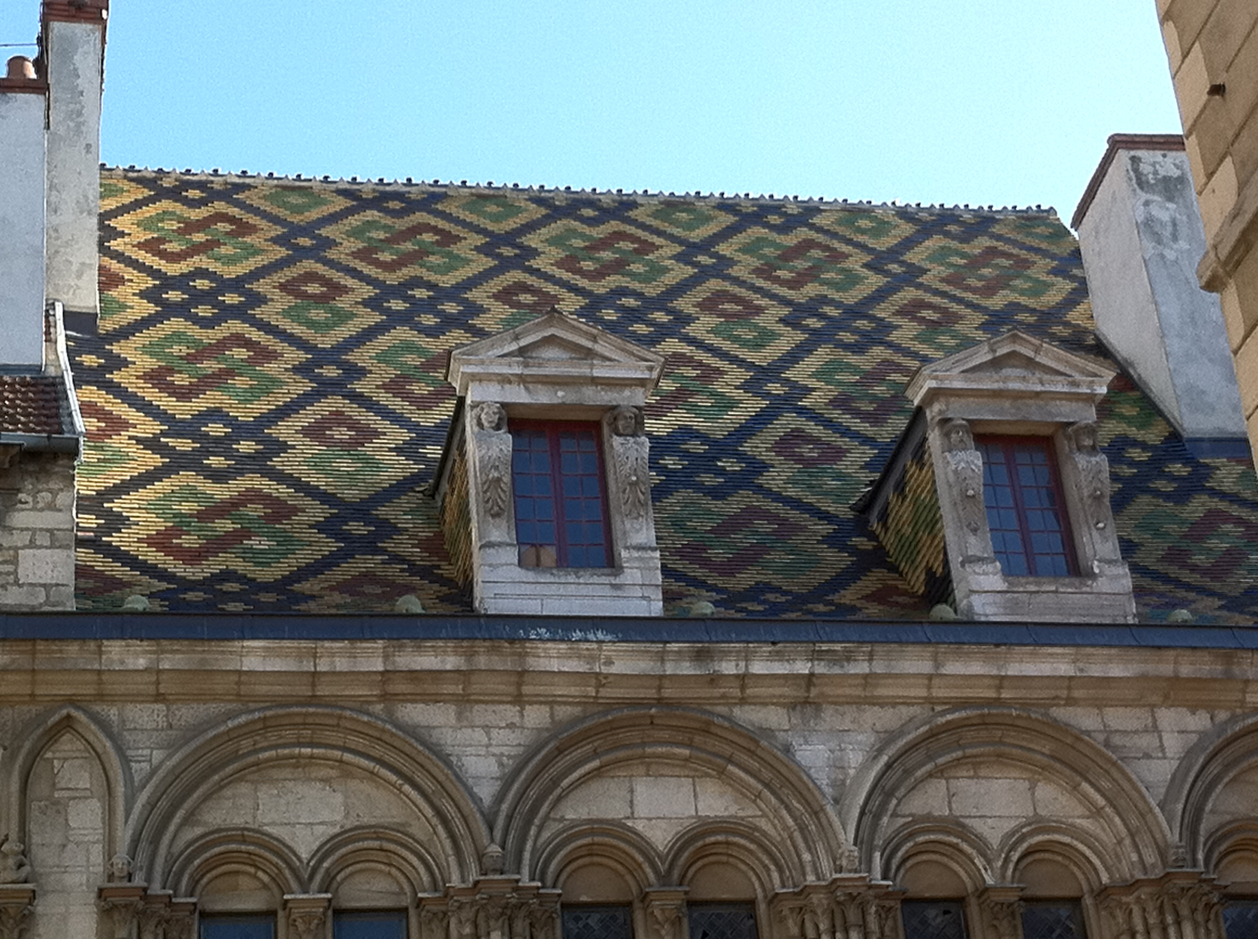 Tuiles vernissées de Dijon